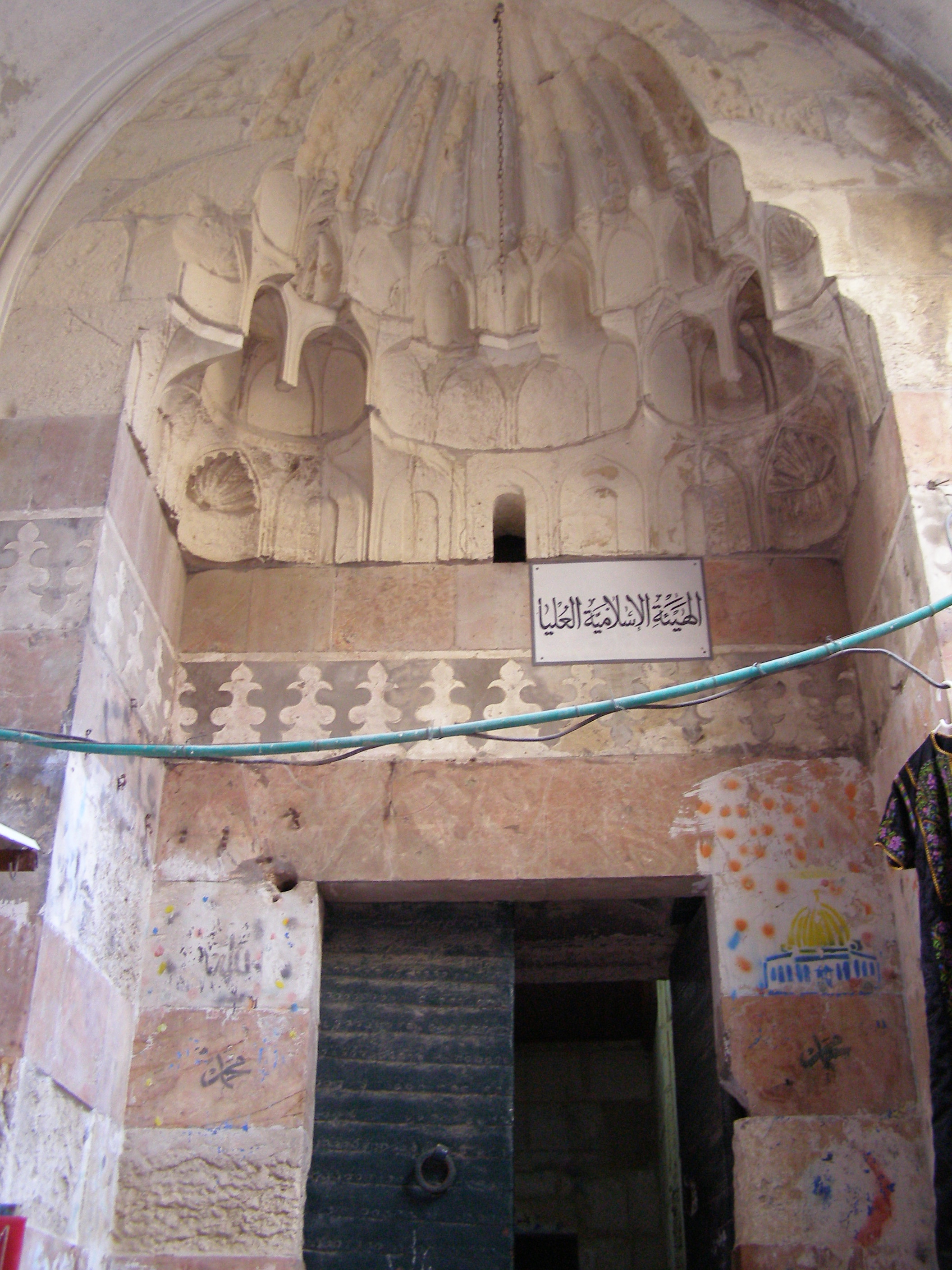 תשטמוריה רישיון נוצר על ידי משתמש:Ranbar